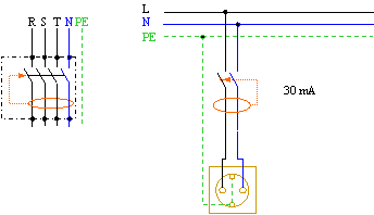 Схеми на свързване.